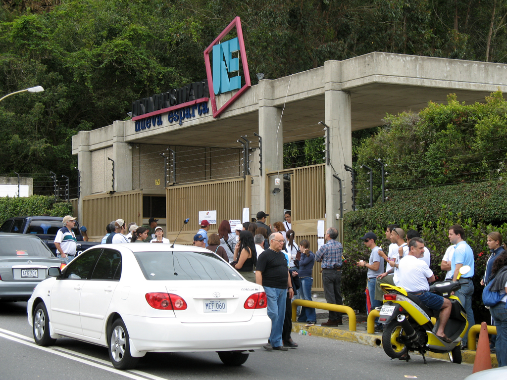 Centro de votación: Universidad Nueva Esparta, Municipio El Hatillo, Caracas.